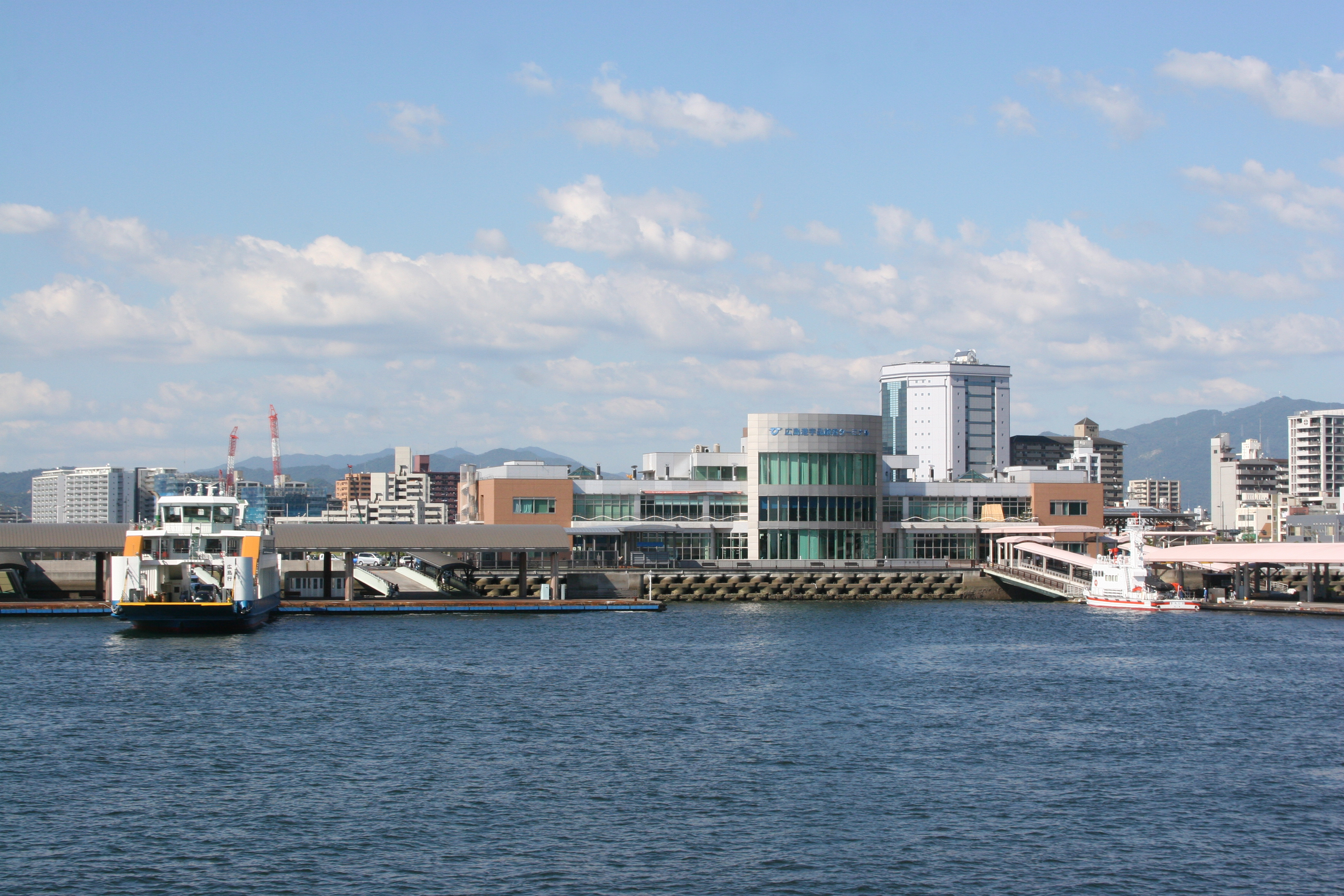 Hiroshima Port Ujina Passenger Terminal